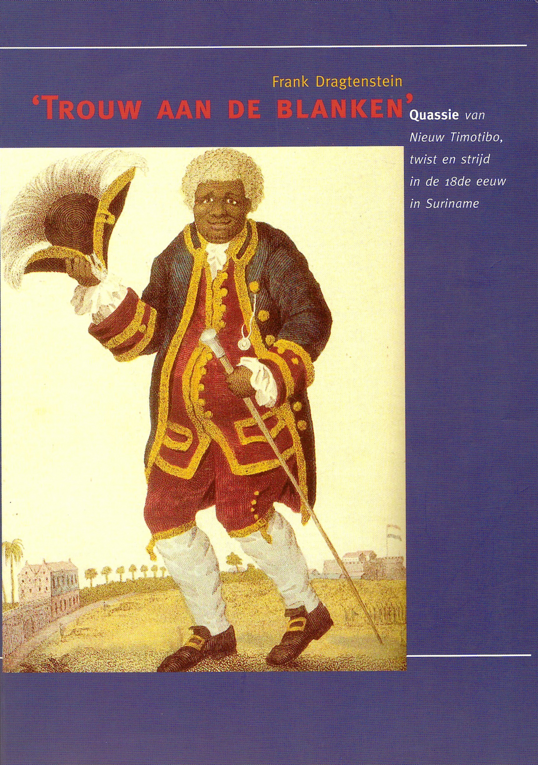 Dragtensteins studie over Quassie van Timotibo. Eigen scan, met toestemming van de auteur.